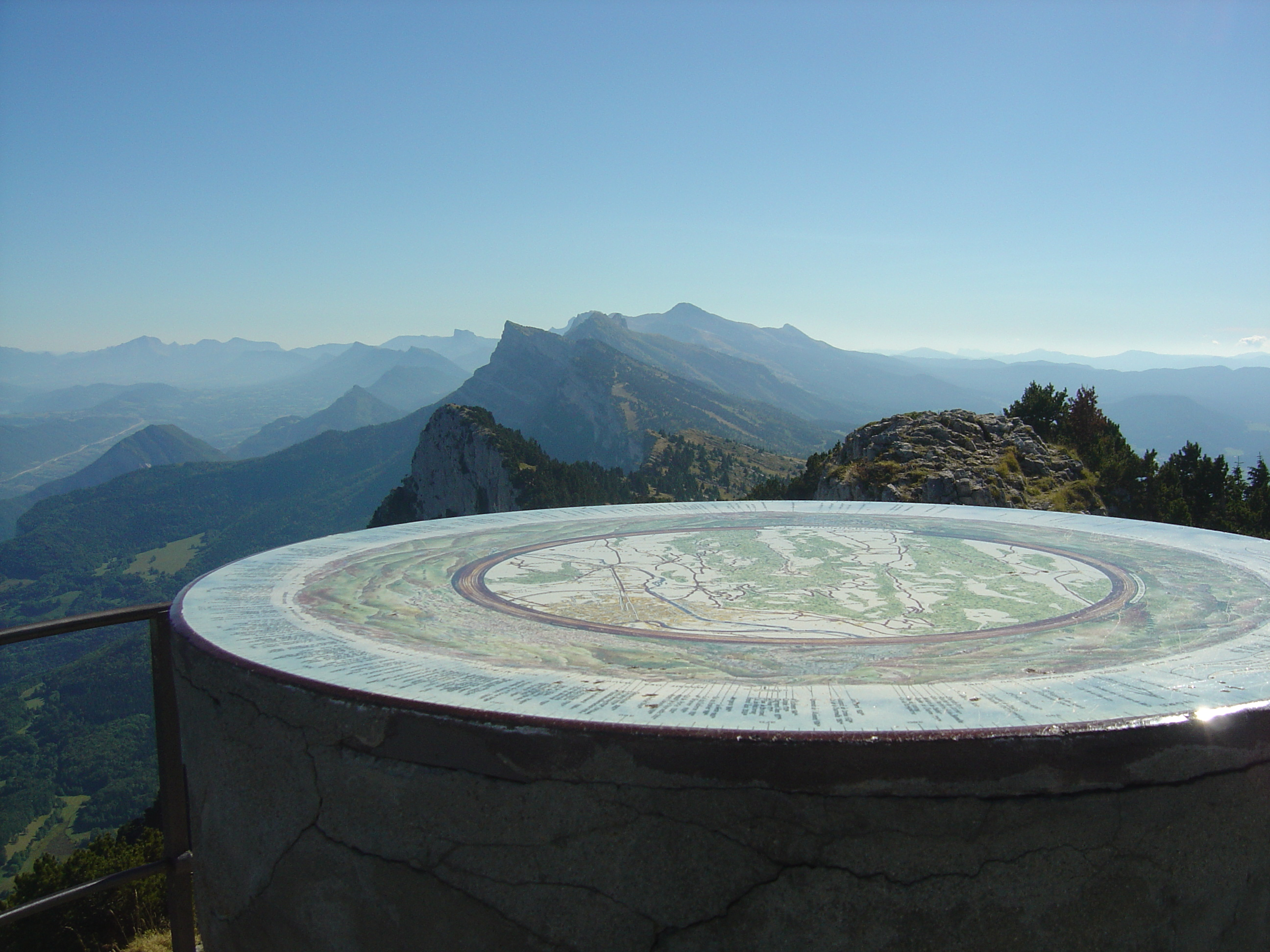 Table d'orientation sur une longue crête de montagnes.